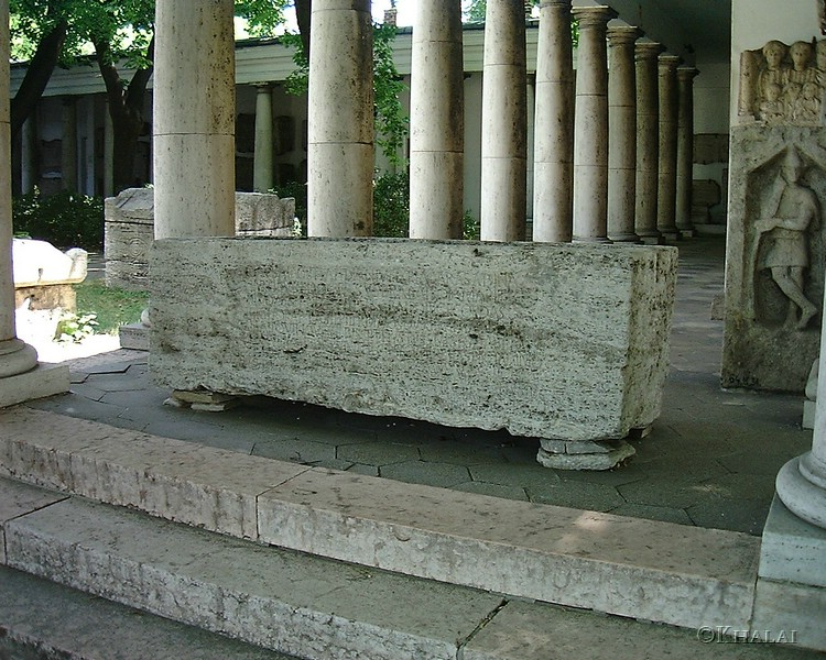 Aelia Sabina szarkofágja a Kr. e. 3. századból az Aquincumi Múzeumban, budakalászi mészkőből kifaragva